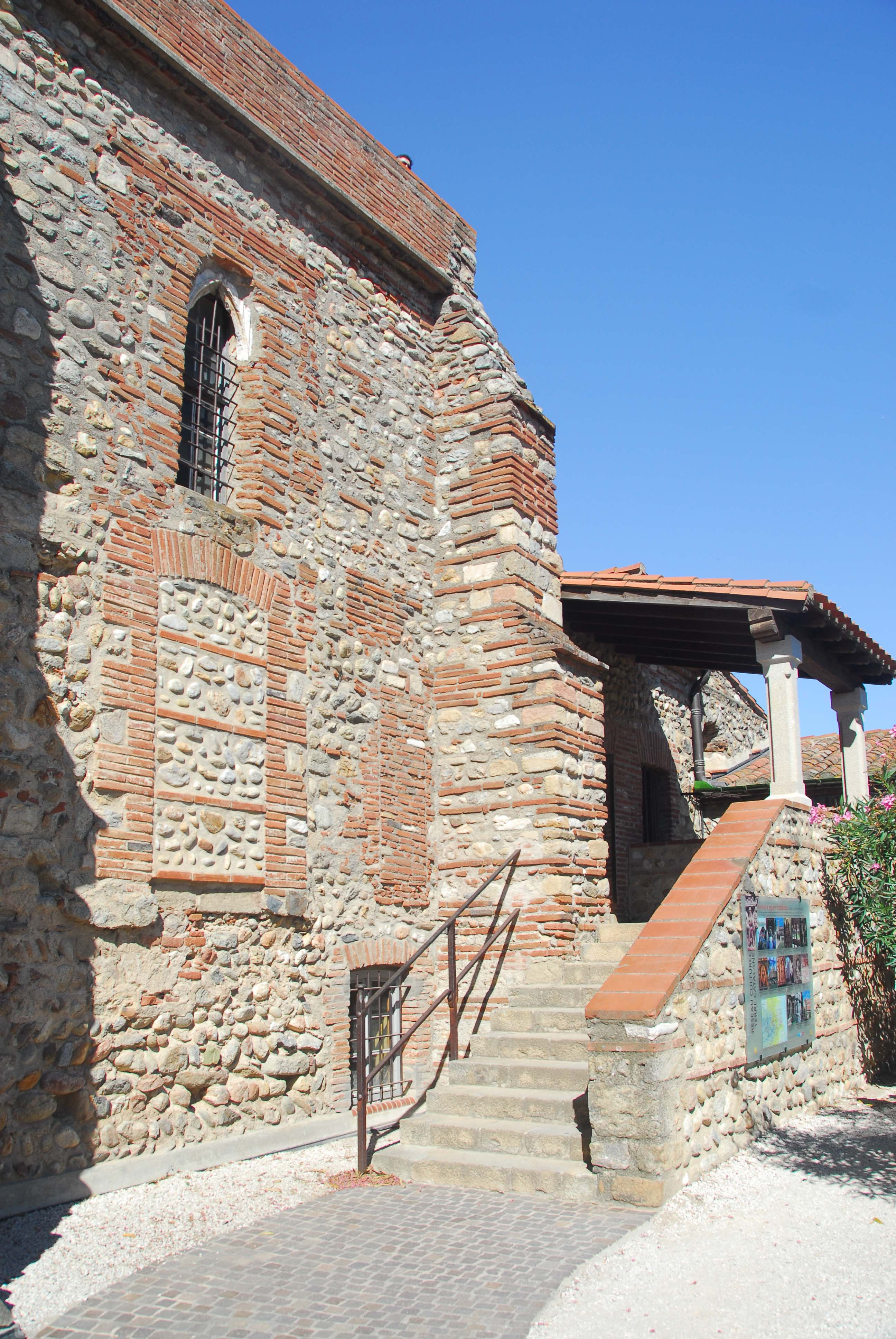 Ste-Eulalie-et-Ste-Julie_d’Elne, Besucherzugang von CO